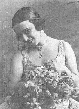 Fotografía de la cantante española Mercedes Serós publicada en 1926